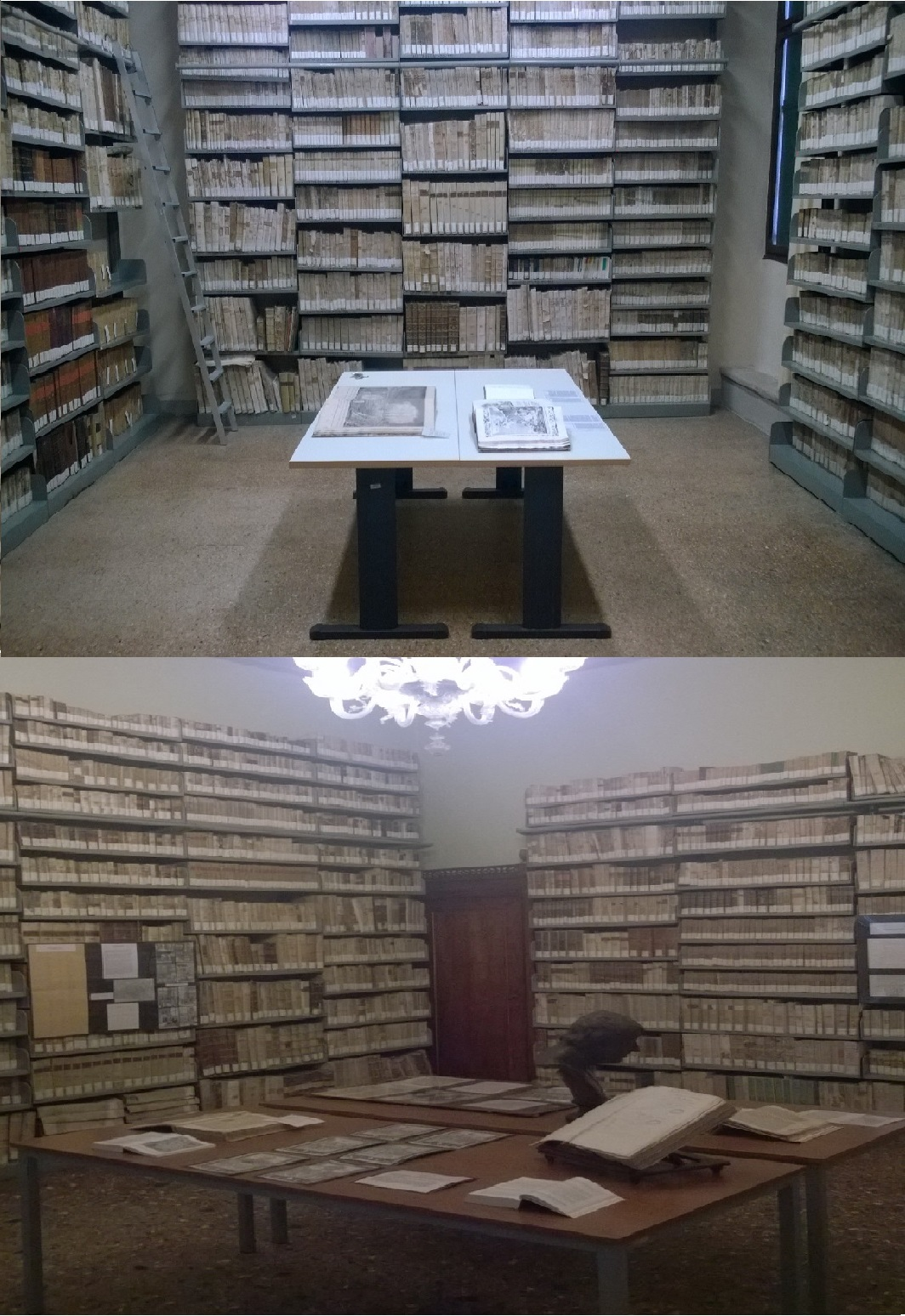 Salalibro antico 1